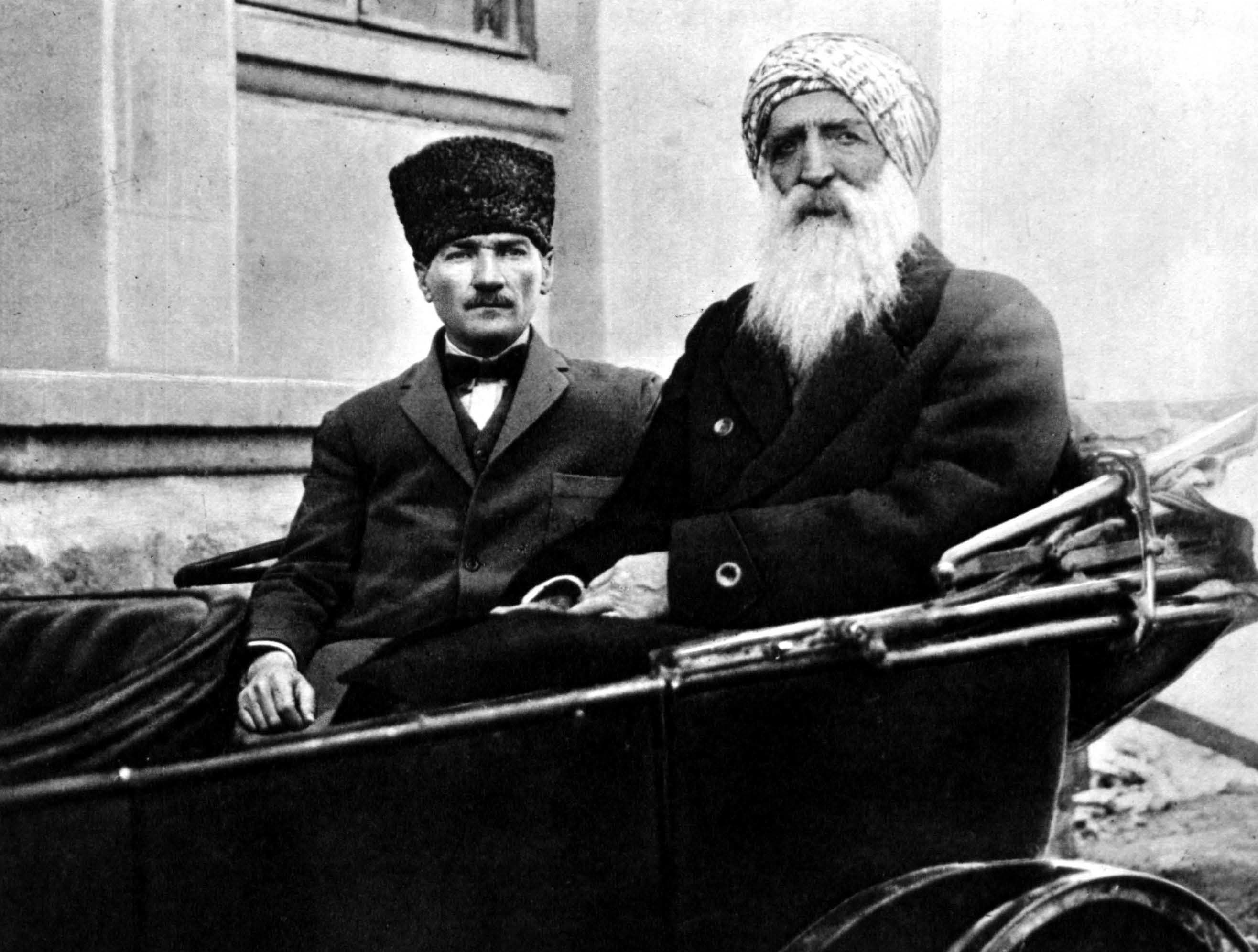 Mustafa Kemal Atatürk and Dersim MP Diyap Ağa